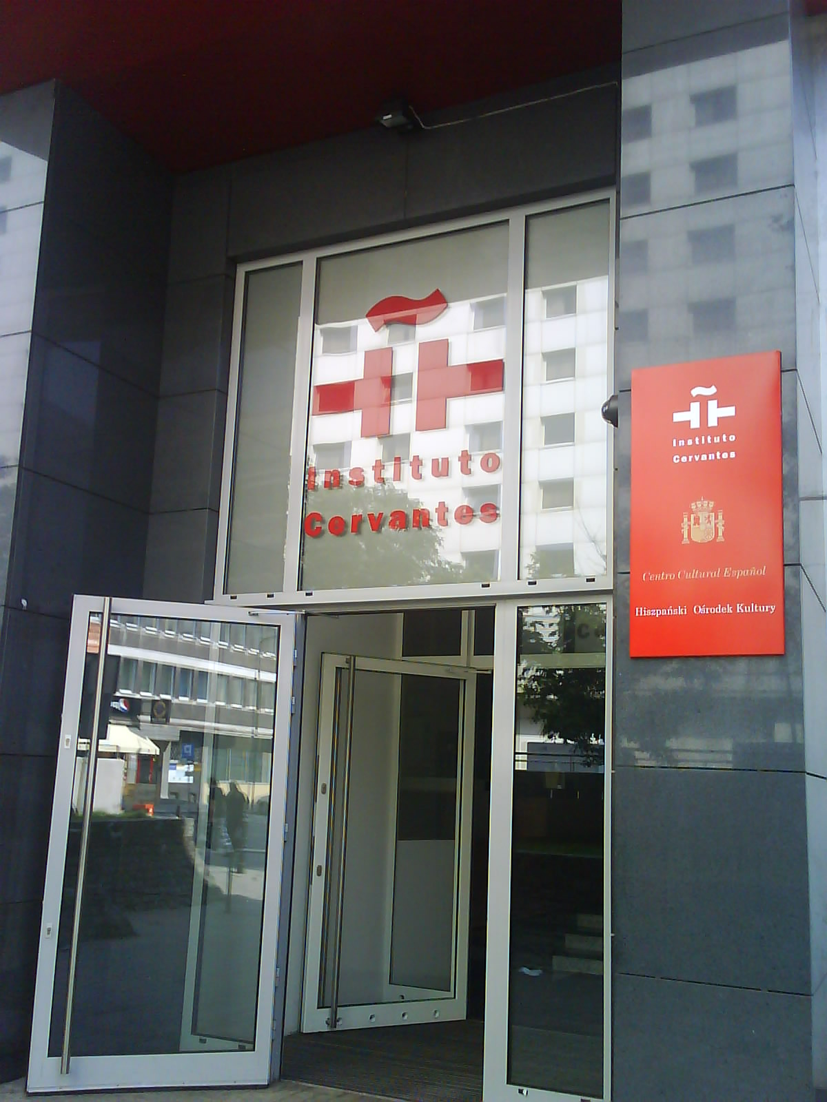 Instytut Cervantesa w Warszawie.